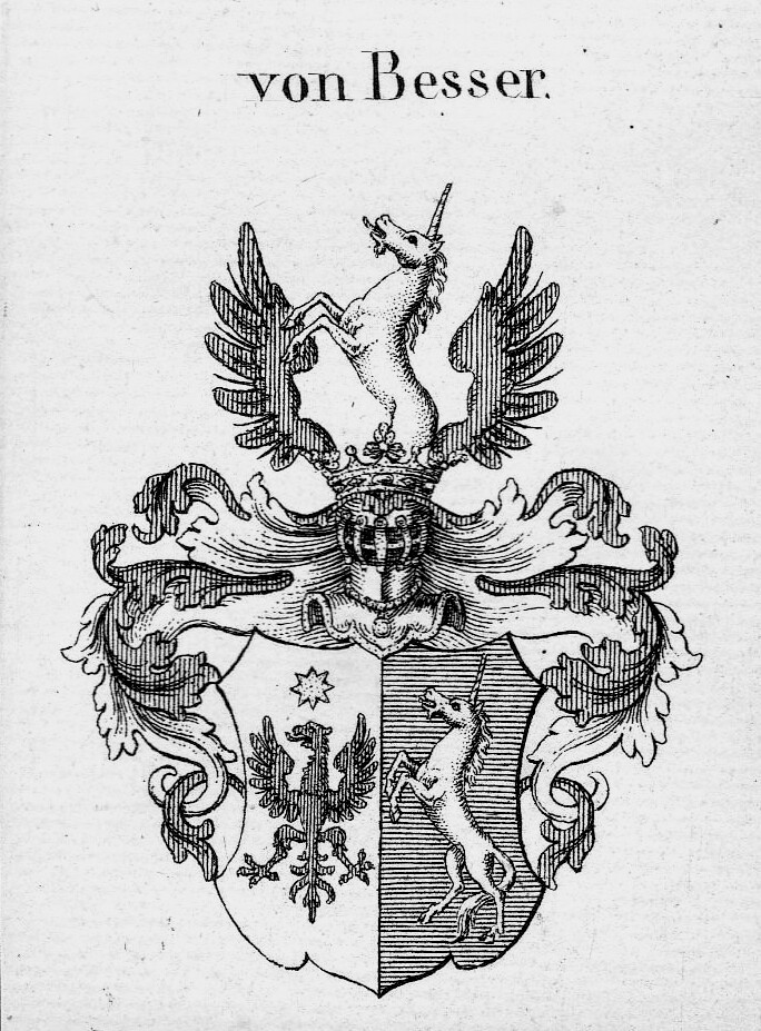 Wappen derer von Besser (1699)